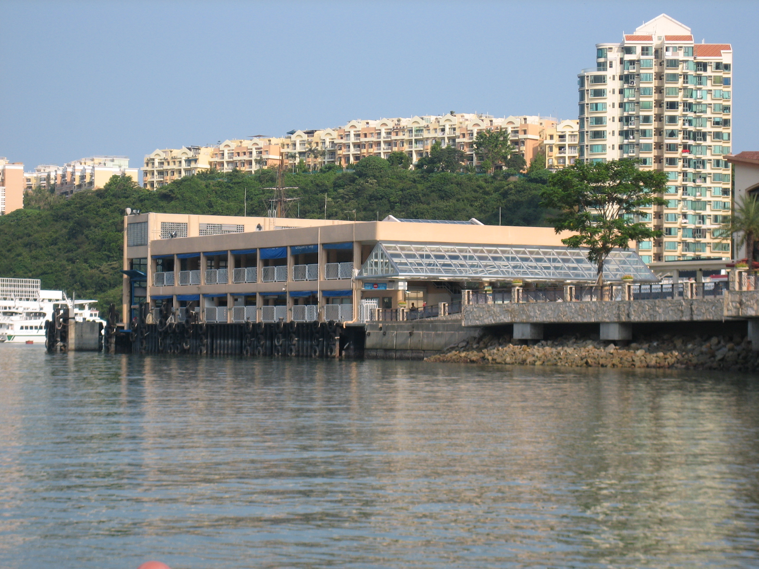 愉景湾码头